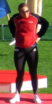 Kirsi Ahonen Kalevan kisoissa, Ratinan stadionilla, Tampereella, 26. heinäkuuta 2008